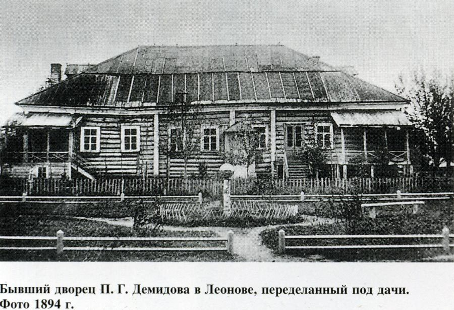 Леоново. Господский дом, 1894 г.